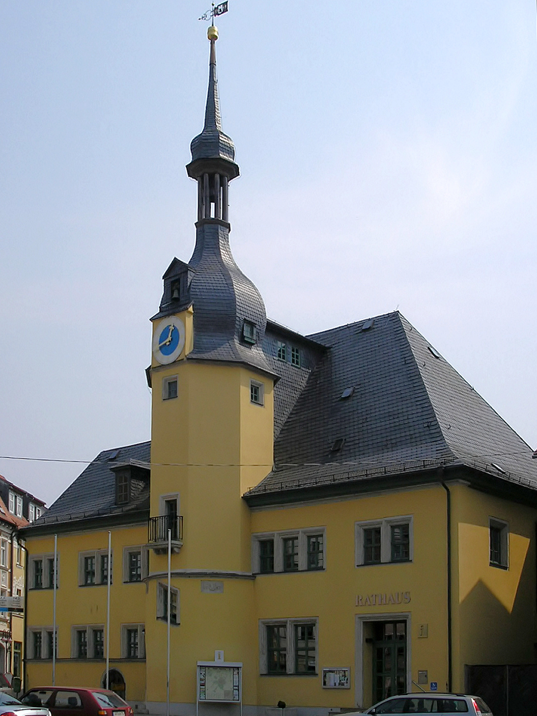 Rathaus von Apolda (Thüringen) am Marktplatz.